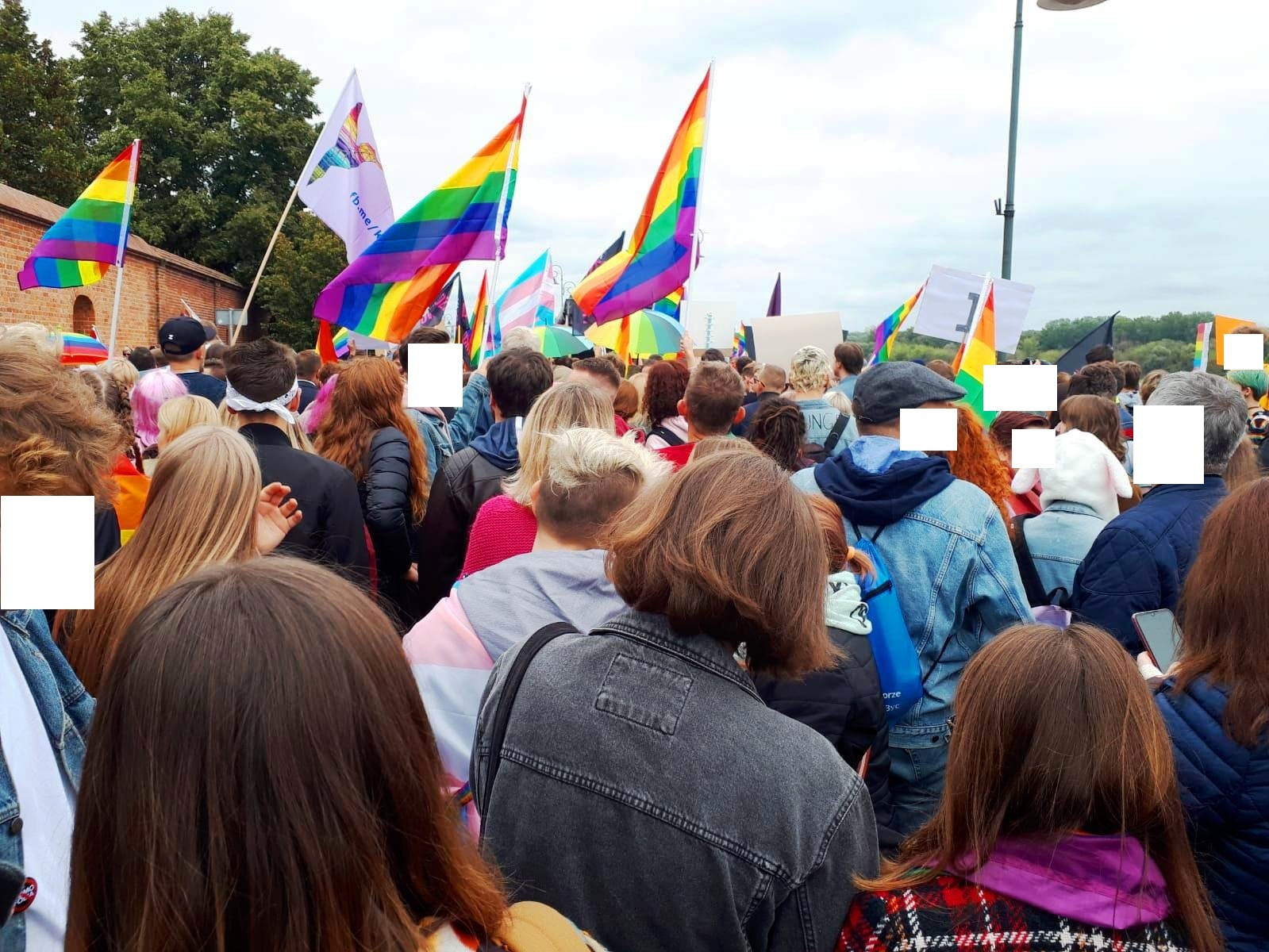 III Marsz Równości w Toruniu, 2019